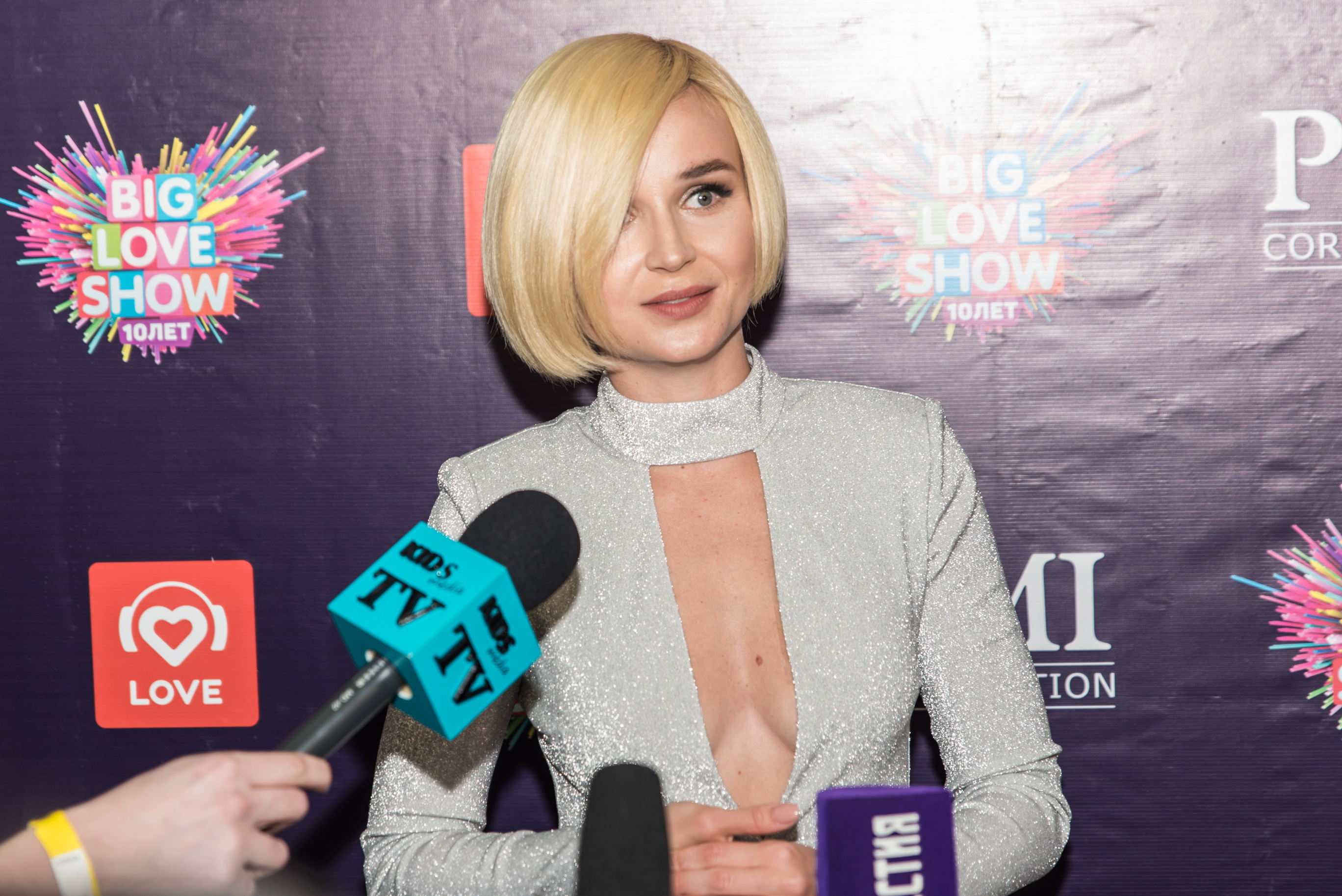 Полина Гагарина на прессволе на Big Love Show 2018 в СПб